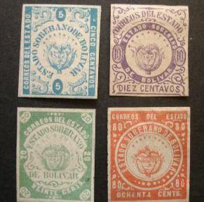 Klikañ war un deiziad/eur da welet ar restr evel ma oa da neuze.